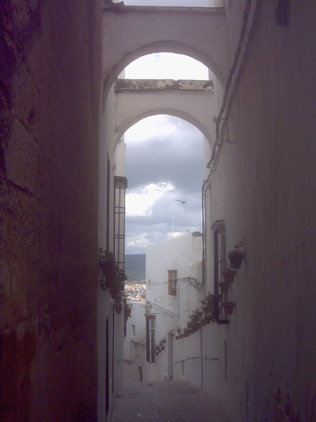 Calle de Arcos Calle de Arcos de la Frontera (Cádiz)